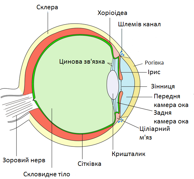 Будова ока